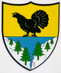 Wappen von Enges Kanton Neuenburg Schweiz